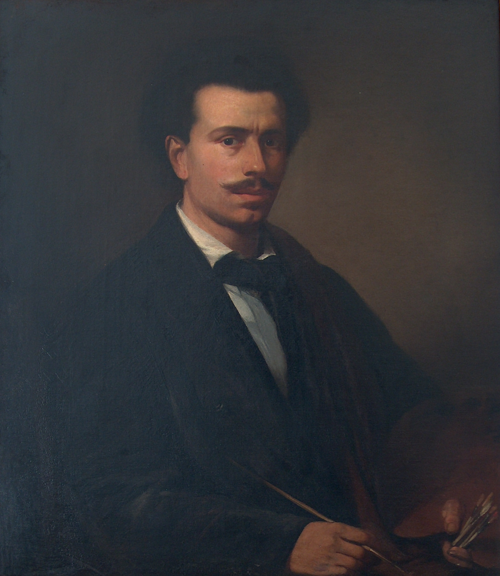 Self-portrait José Rodrigues (1828-1887)